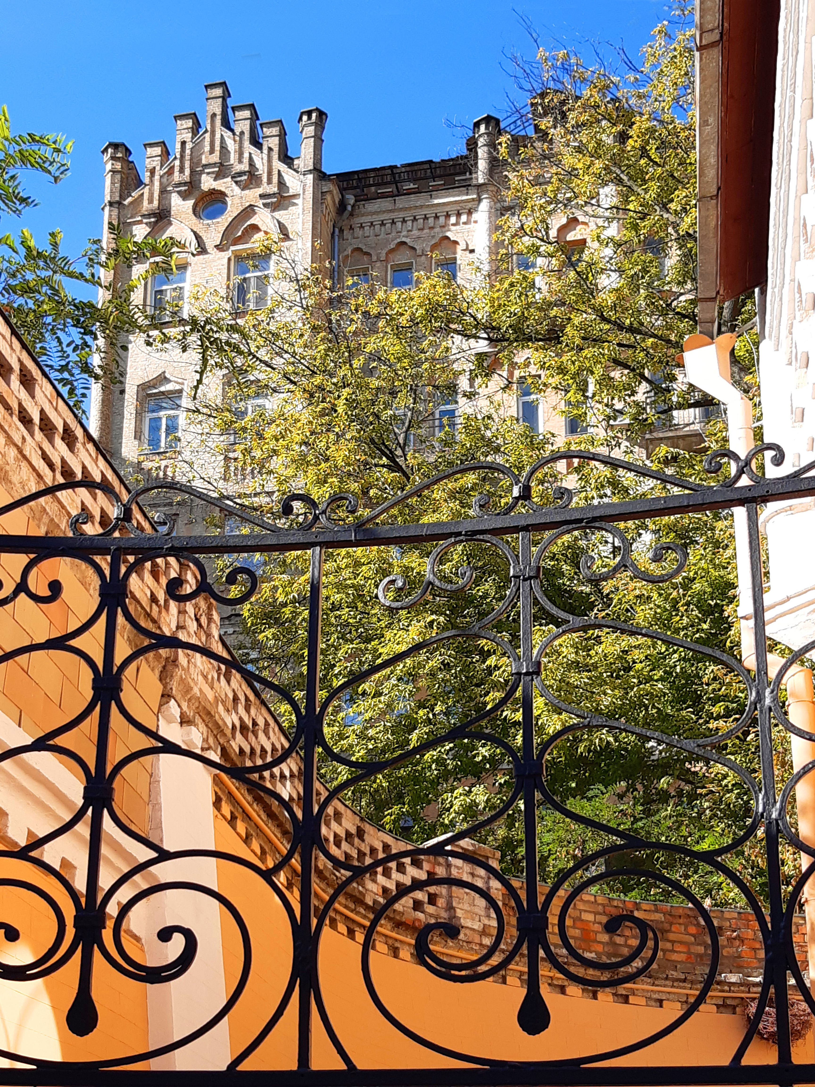 Садиба міська М. Лапинського, Київ, вул. О. Гончара, 60